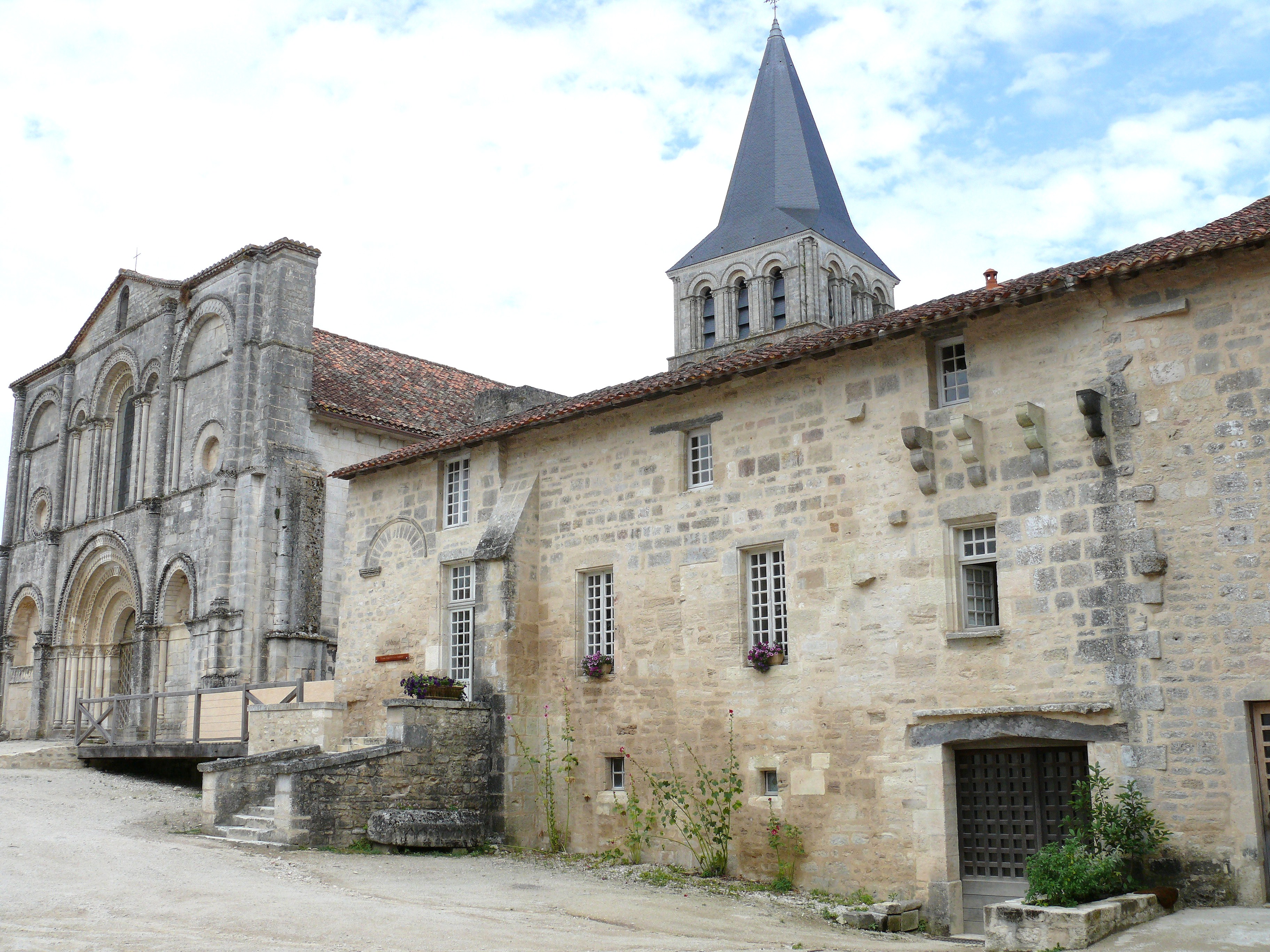 Saint-Amant-de-Boixe - Ensemble des bâtiments